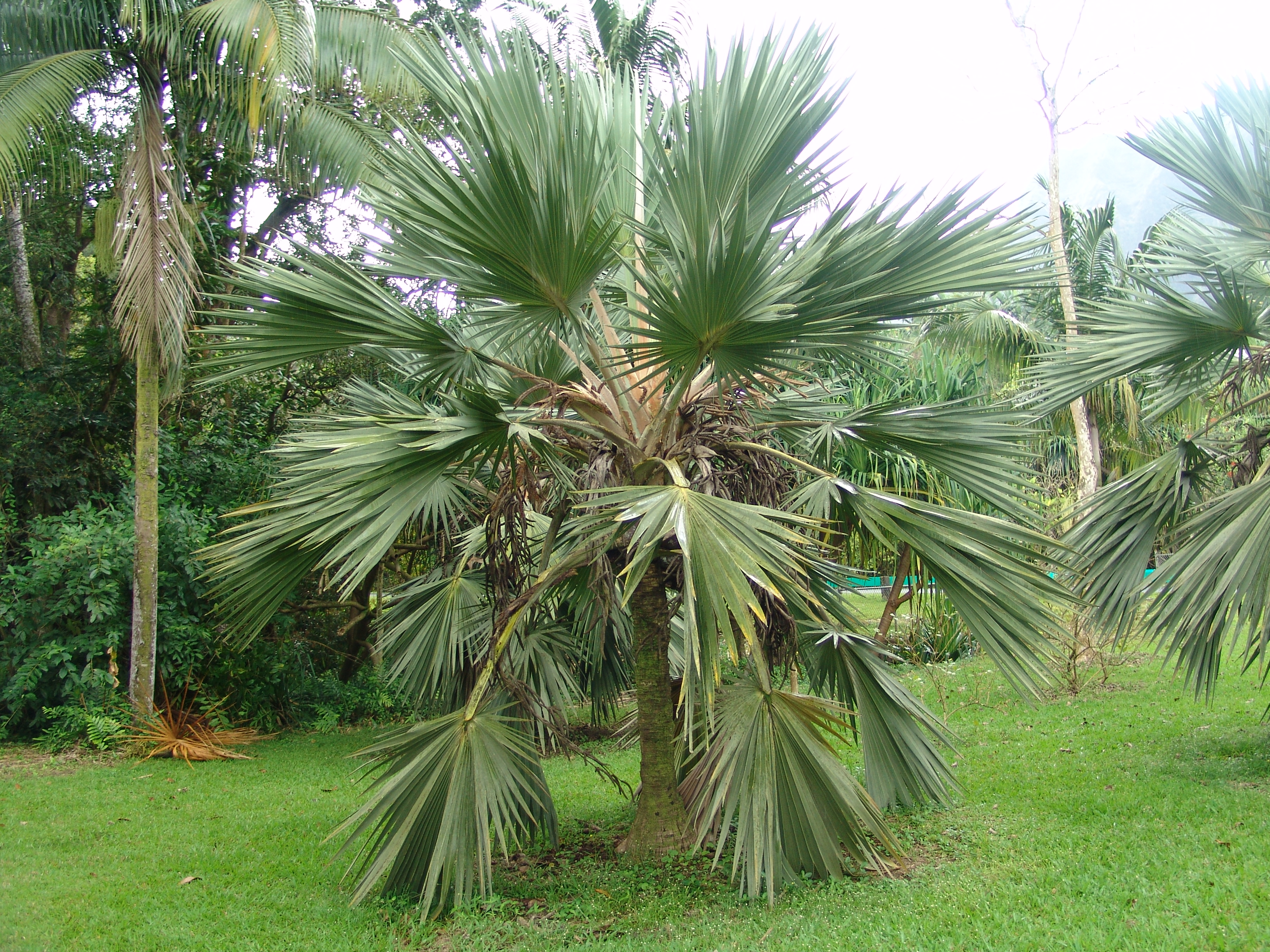 Blue Latan шт Ho'omaluhia Botanical Garden Oahu Hawaii